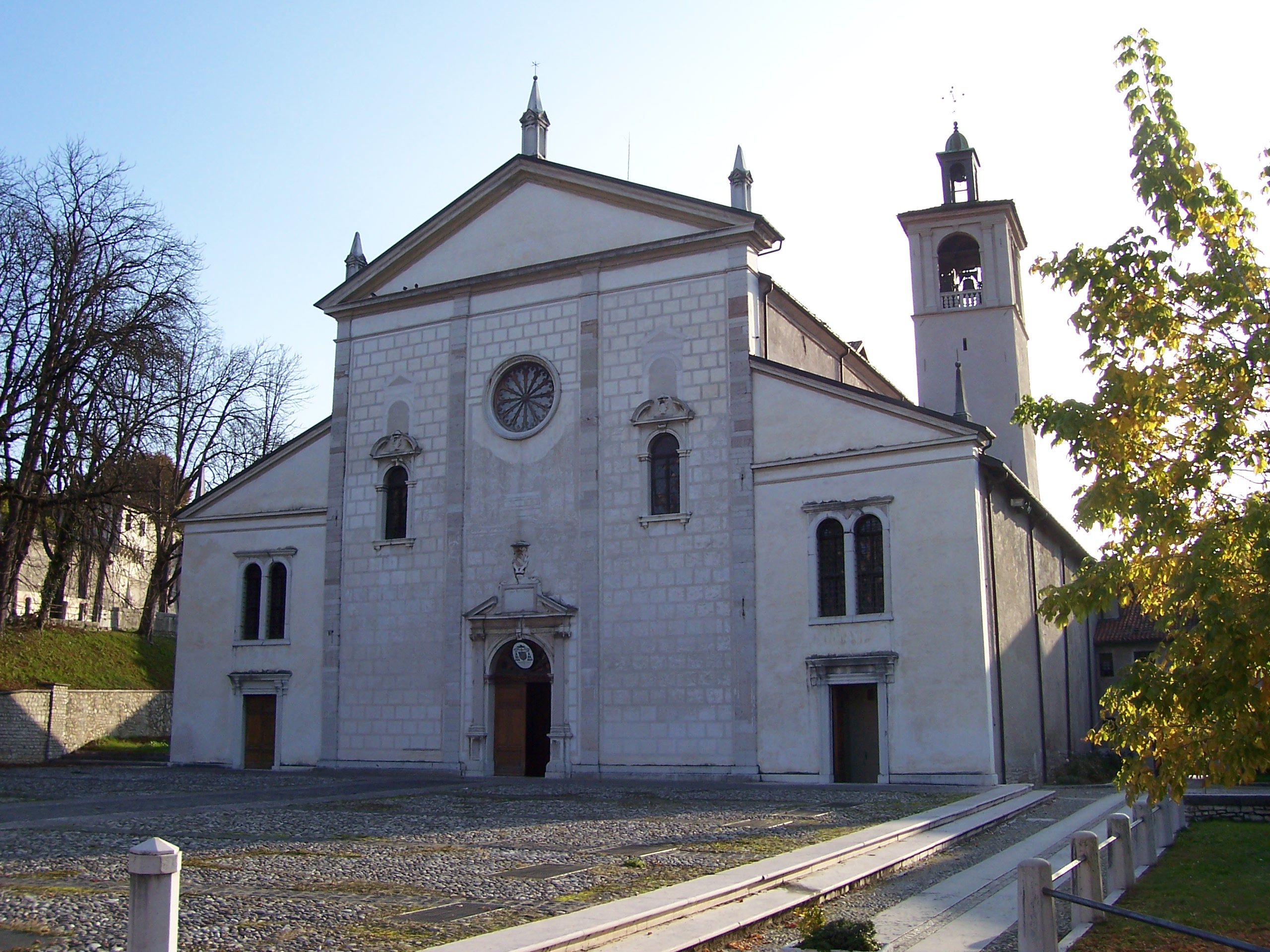 Duomo di Feltre, ottobre 2008